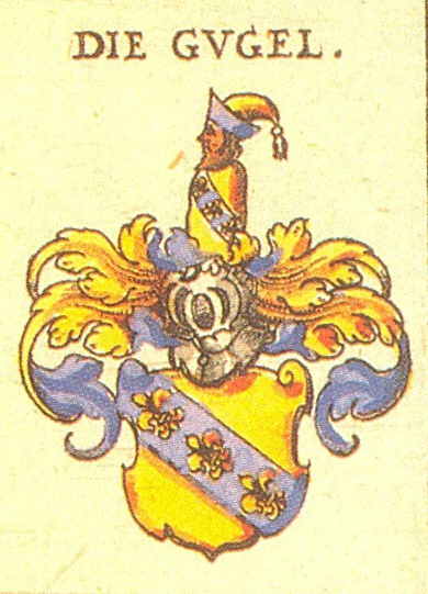 Wappen der Nürnberger ehrbaren Familie und seit 1729 Patrizierfamilie Gugel von Brand und Diepoltsdorf